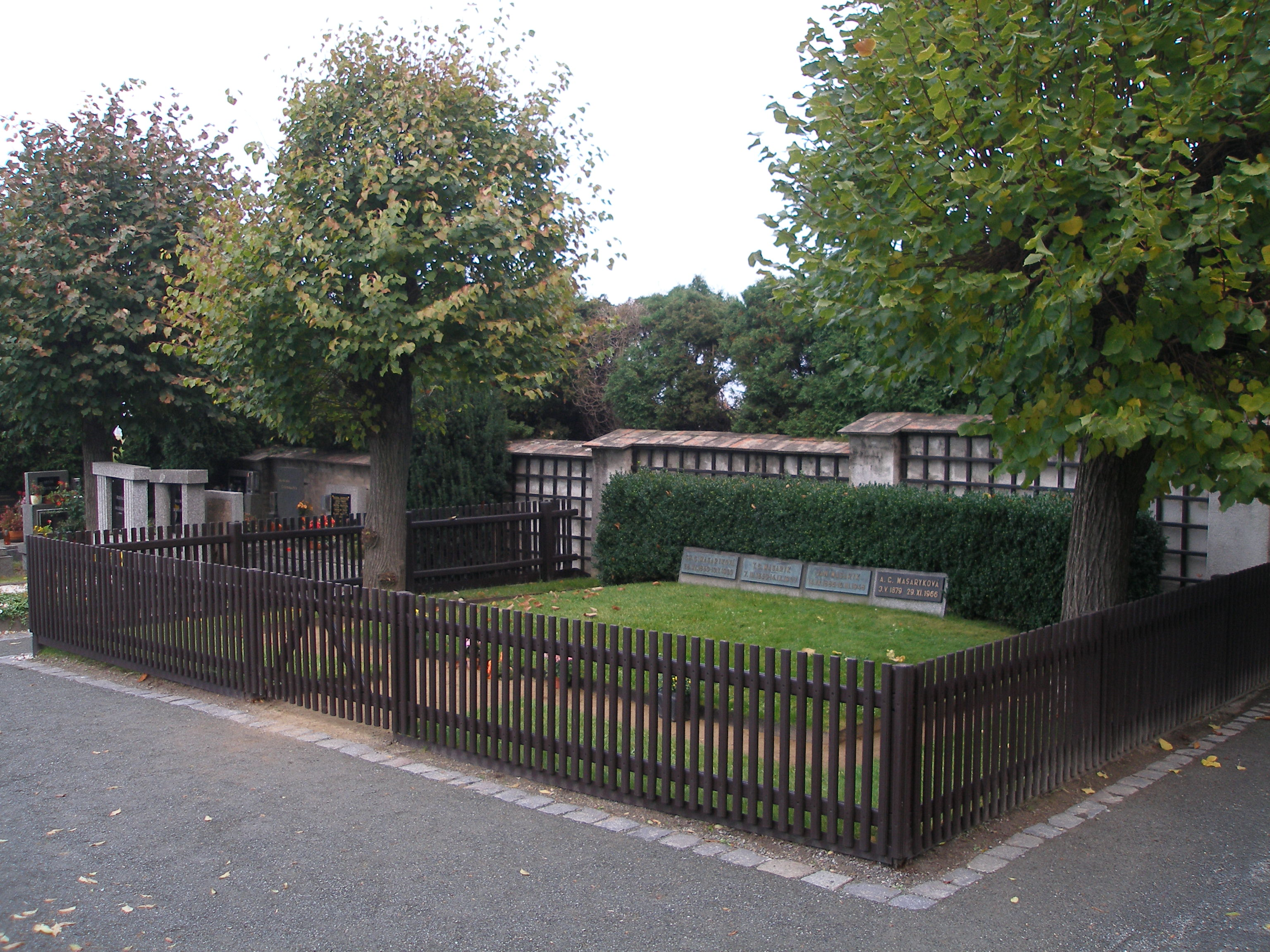 Celkový pohled na hrob Charlotty Garigue Masarykové, Tomáše Garrigue Masaryka, Jana Masaryka a Alice Garigue Masarykové.